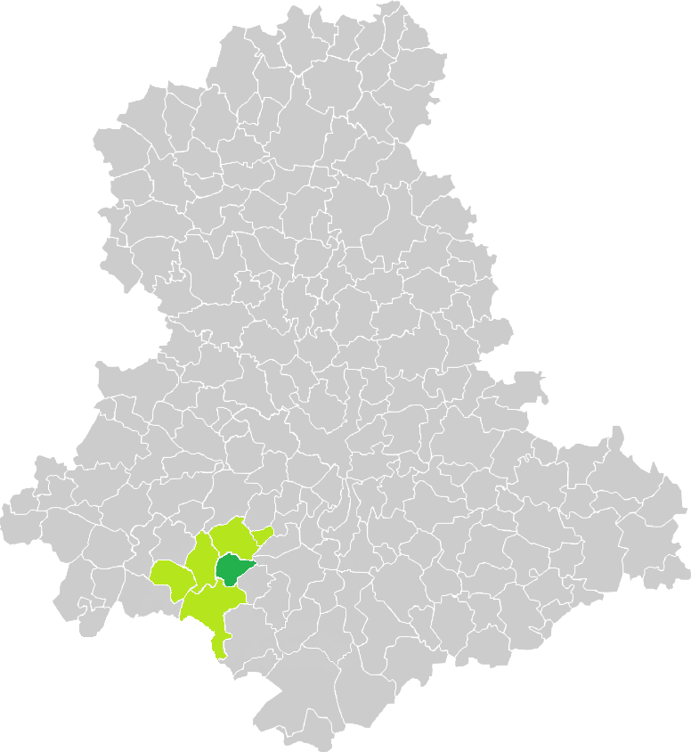 Carte de situation de la commune des Cars (en vert foncé) dans le votre Canton (en vert clair) sur une carte des communes de la Haute-Vienne